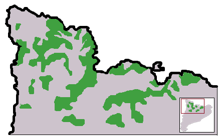 Distribució del pi negre (pinus mugo) al Pirineu català.